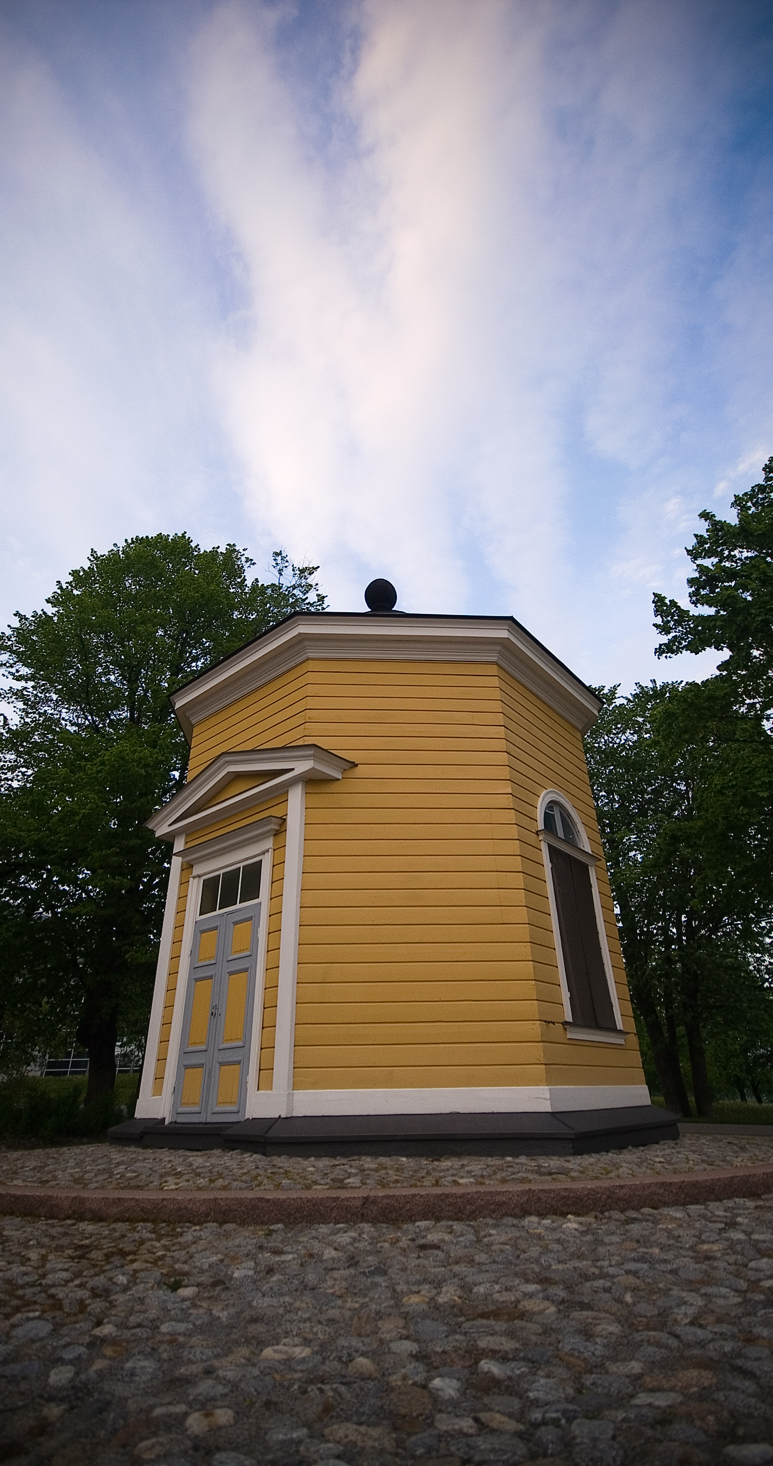 Kupittaan lähdepaviljonki.